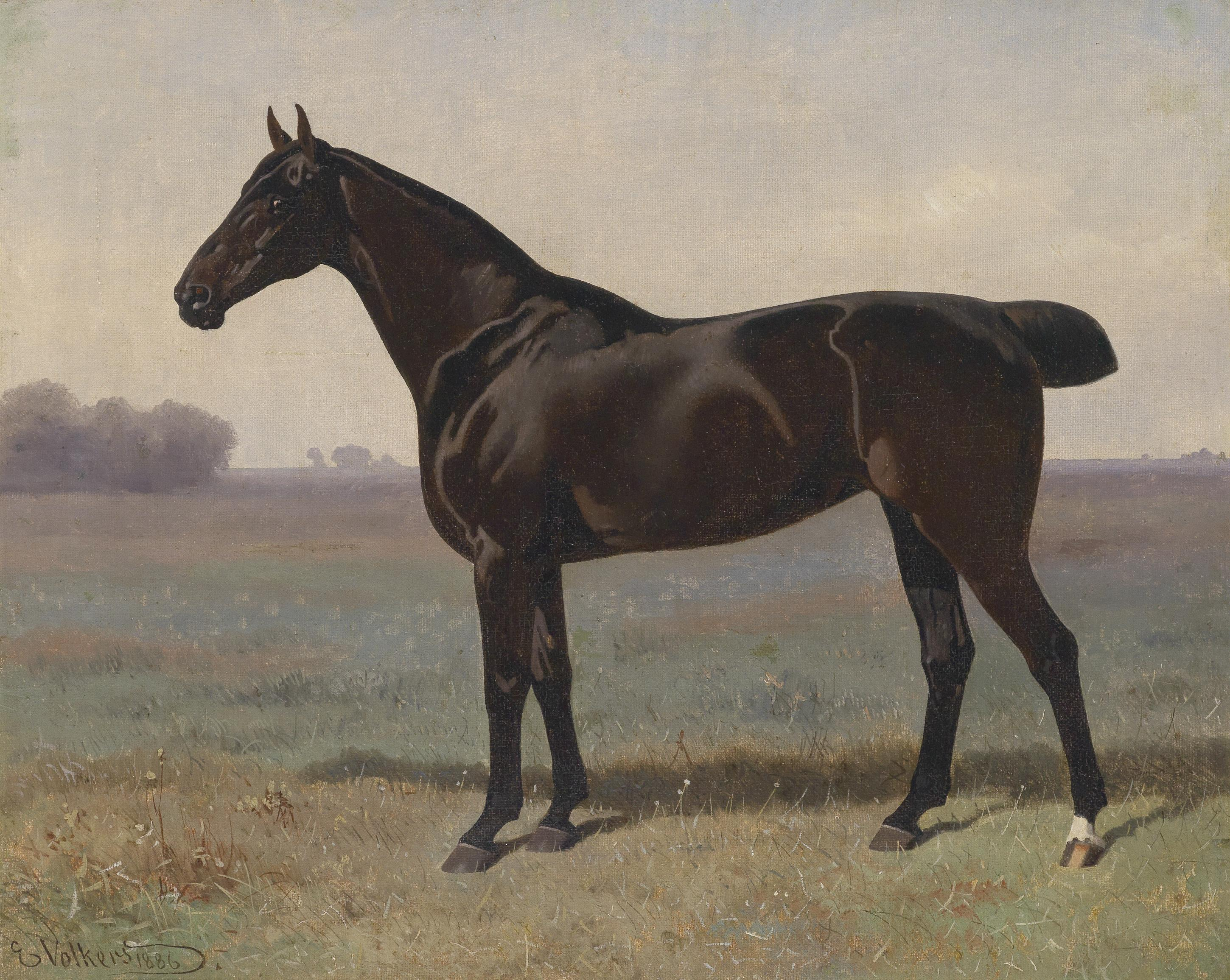 Rappe in Landschaft, signiert, datiert E. Volkers 1886, Öl auf Leinwand, 37,5 x 46 cm